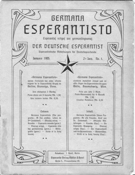 Germana Esperantisto, januaro 1905